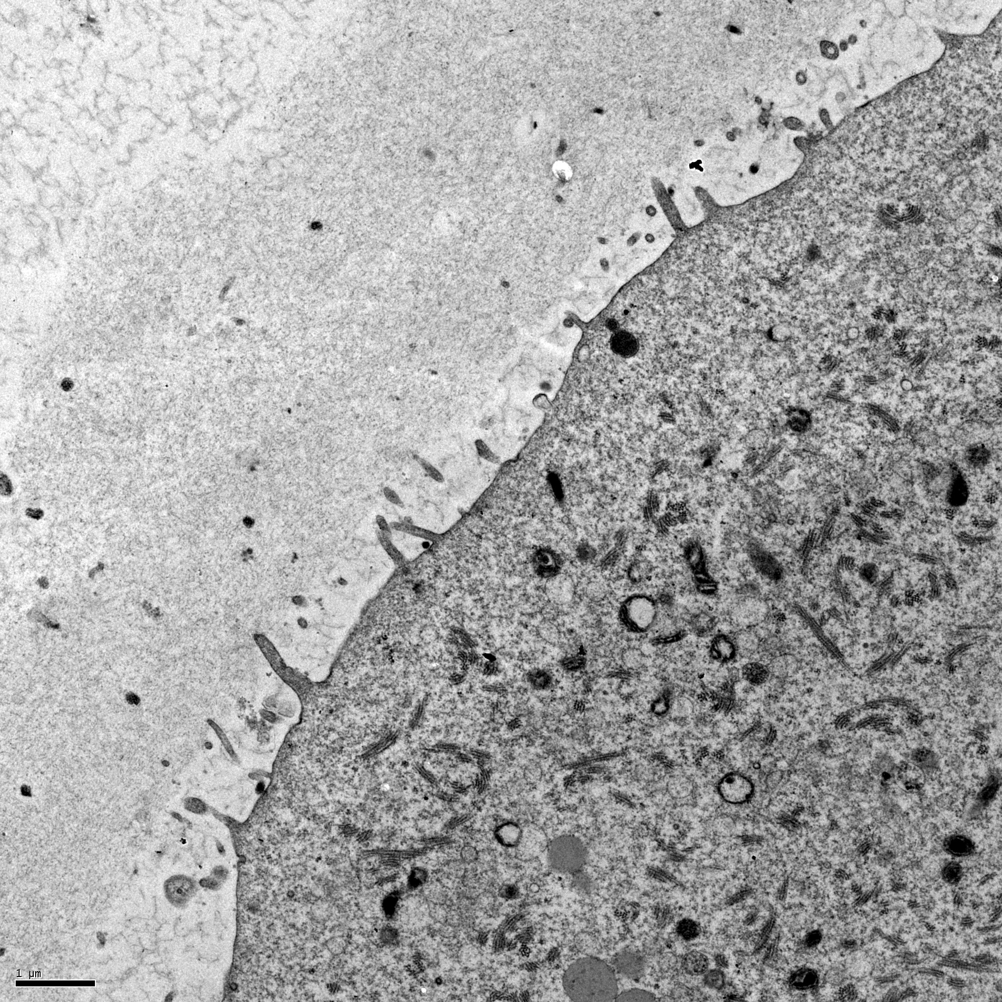 Zonna pellucida (human).